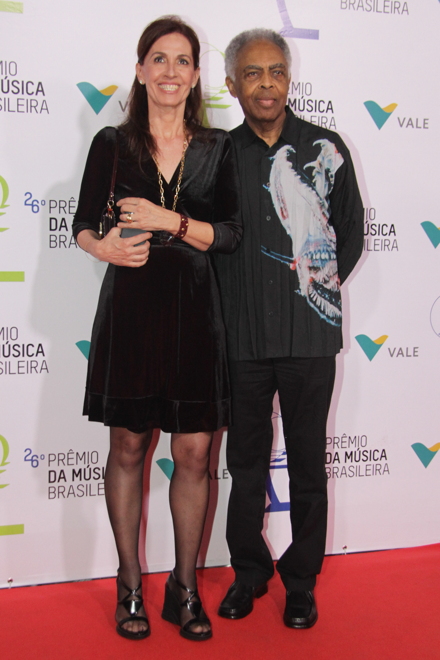 Gilberto Gil e Flora Gil - 26° Prêmio da Música Brasileira 2015, no Theatro Municipal, no Centro do Rio de Janeiro/RJ. (10/06/15) Foto: Roberto Valverde/Divulgacão